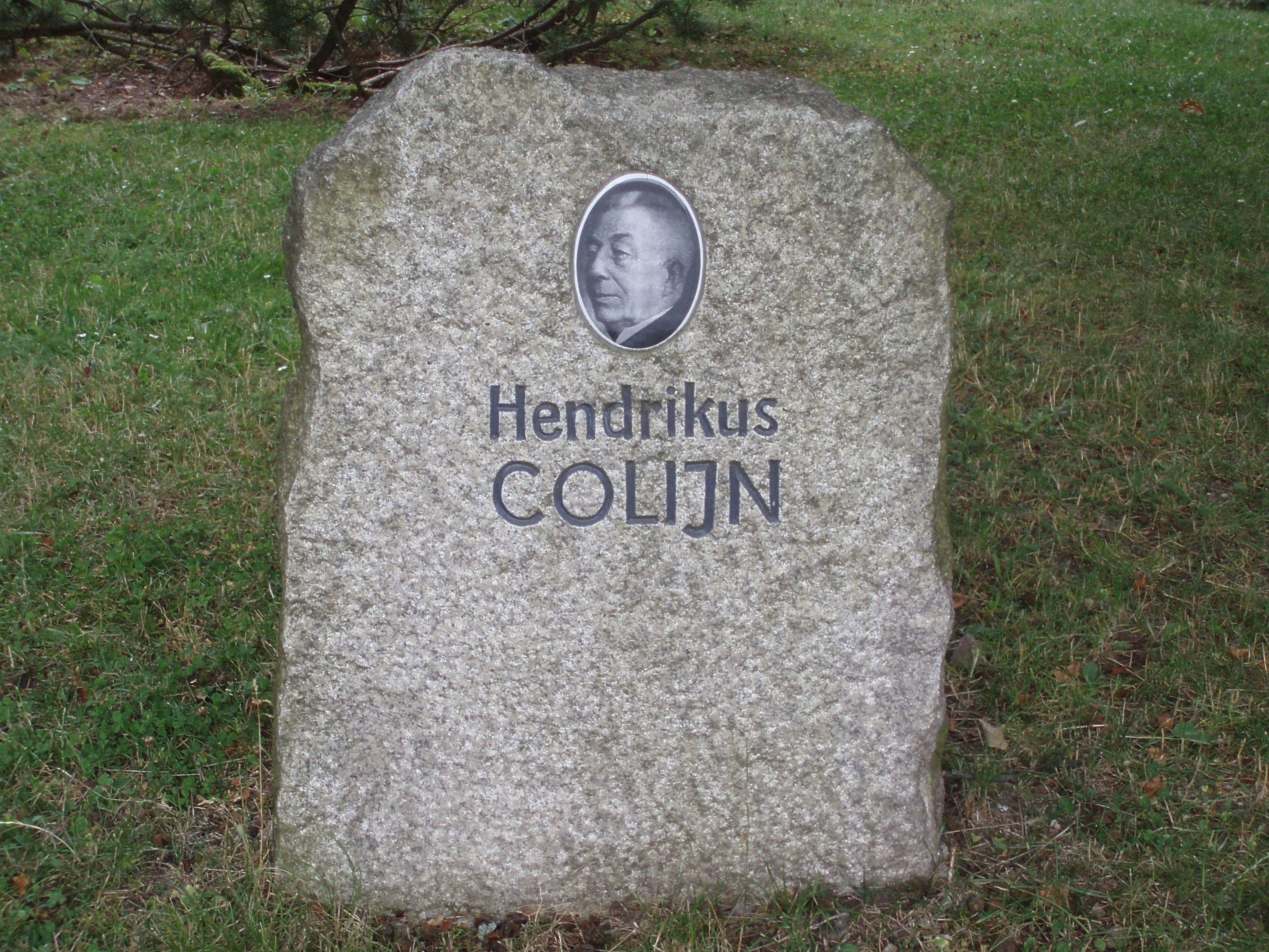 Colijn-Stein in Gabelbach